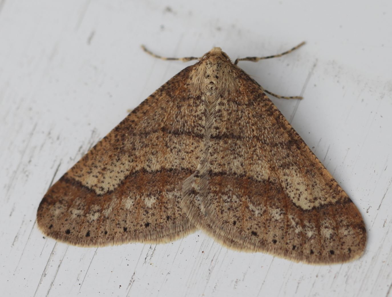 Graugelber Breitflügelspanner (Agriopis marginaria) ♂ am 14. Februar 2020 an Fenstersims nahe Heidelberg